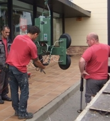 Operarios manipulando una ventosa eléctrica para vidrios.